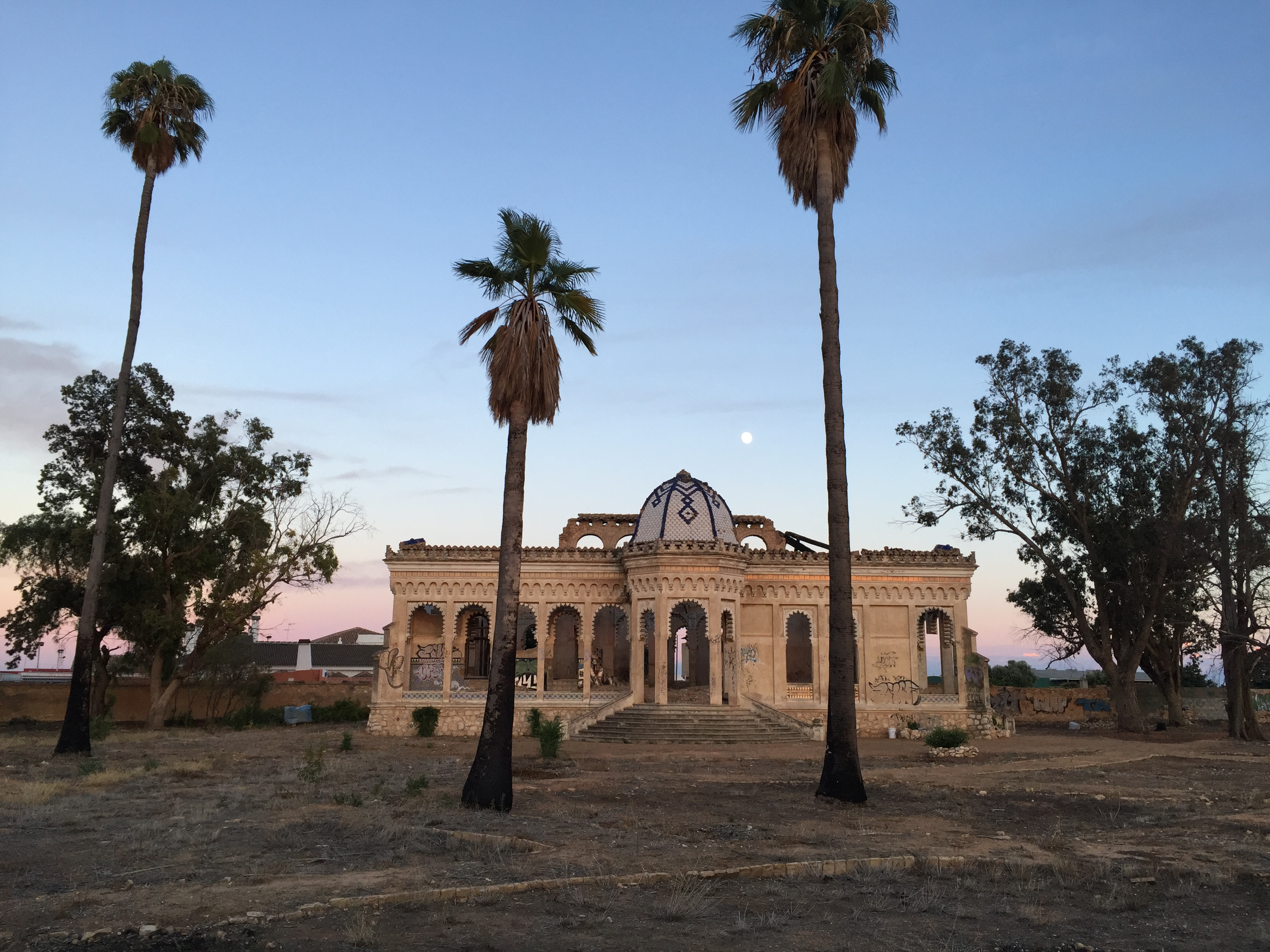 Xalet Giner-Cortina (Torrent) 14.244-005.